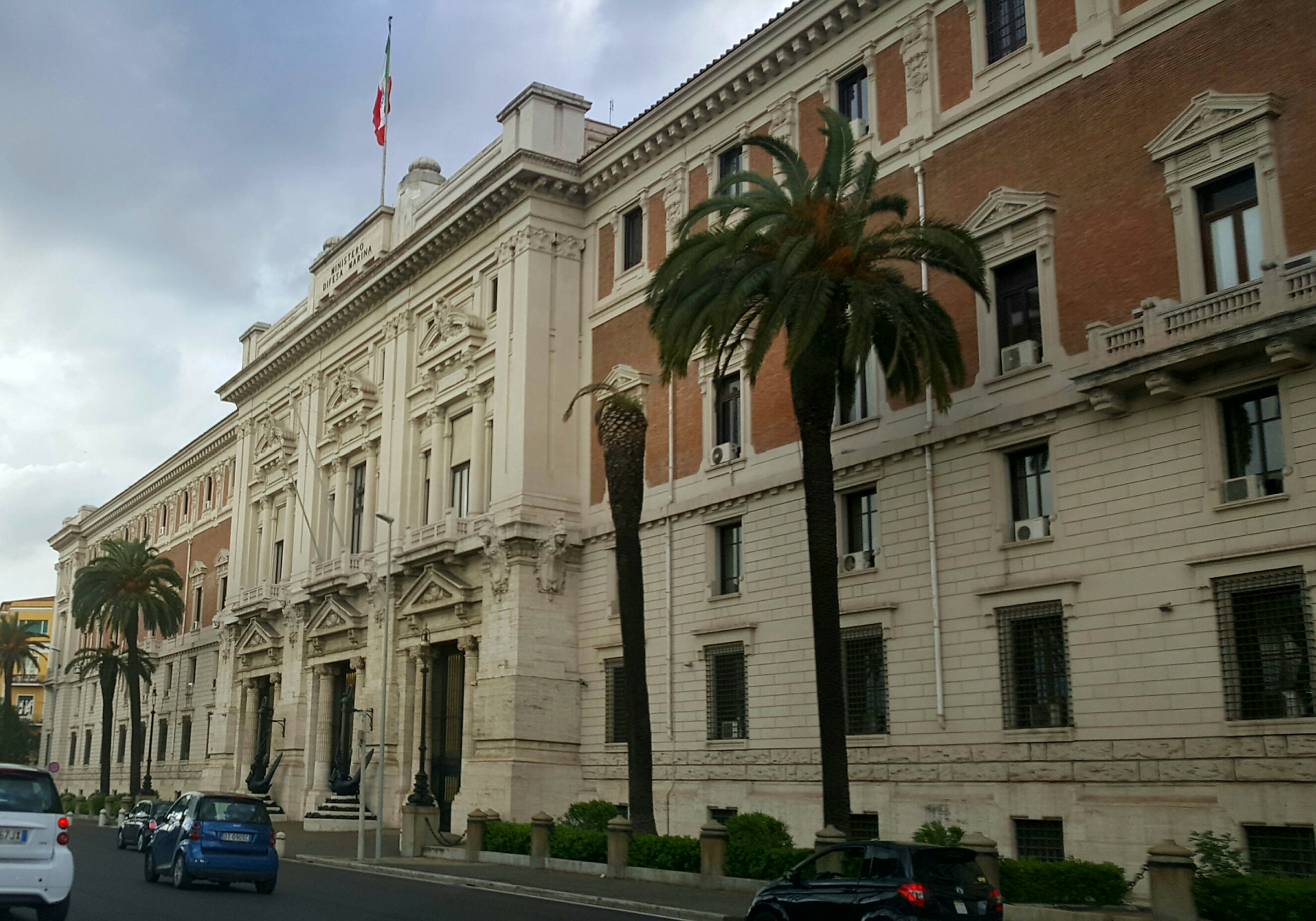 Palazzo Marina del Ministero della Difesa, a Roma, lato Lungotevere delle navi.